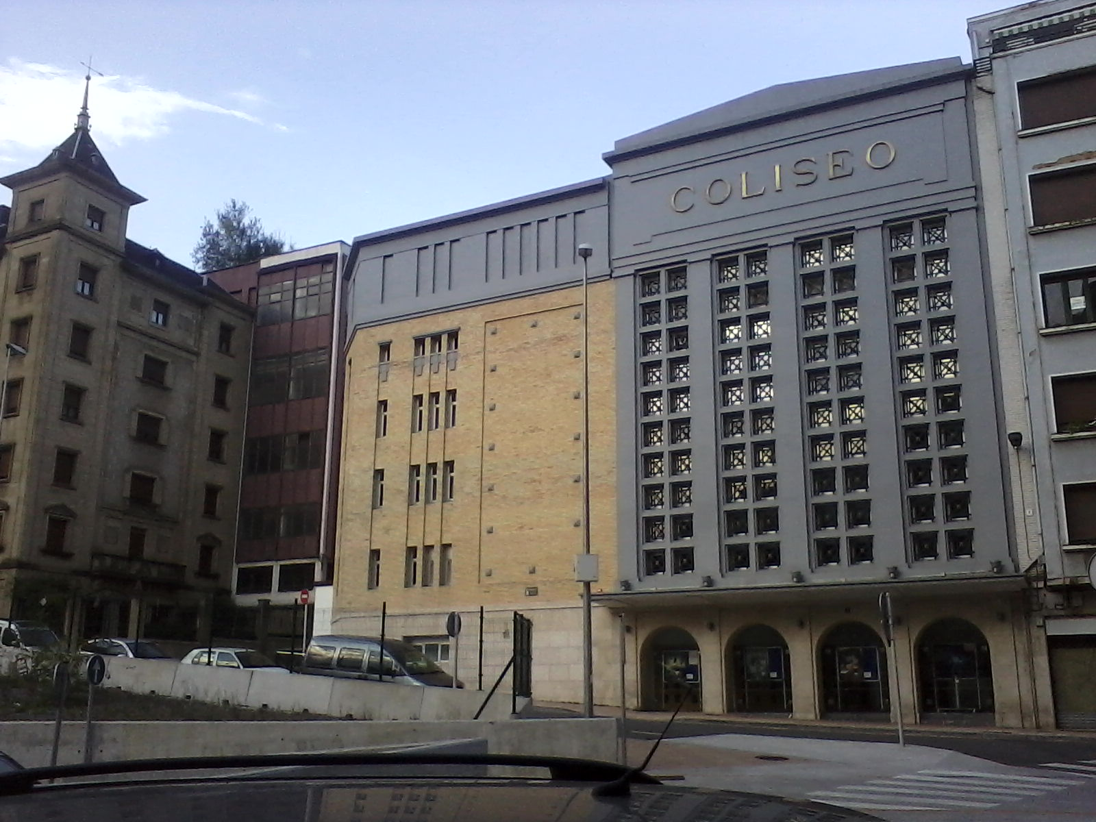 Fachada del Teatro Coliseo renovado